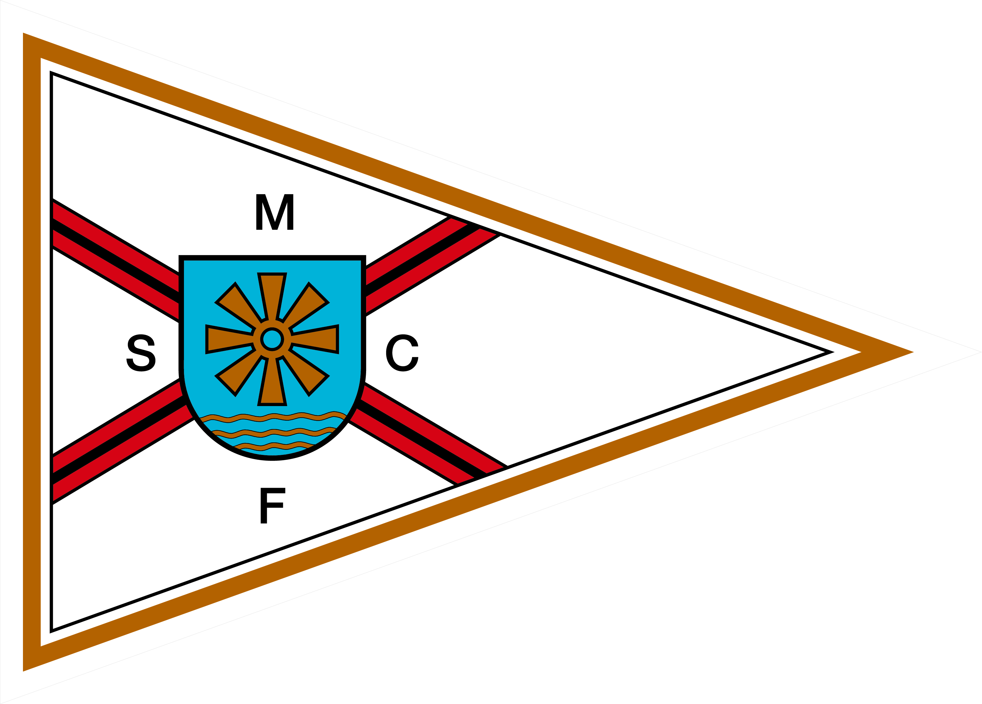 Wimpel des Segel-Motorboot-Club Friedrichshafen